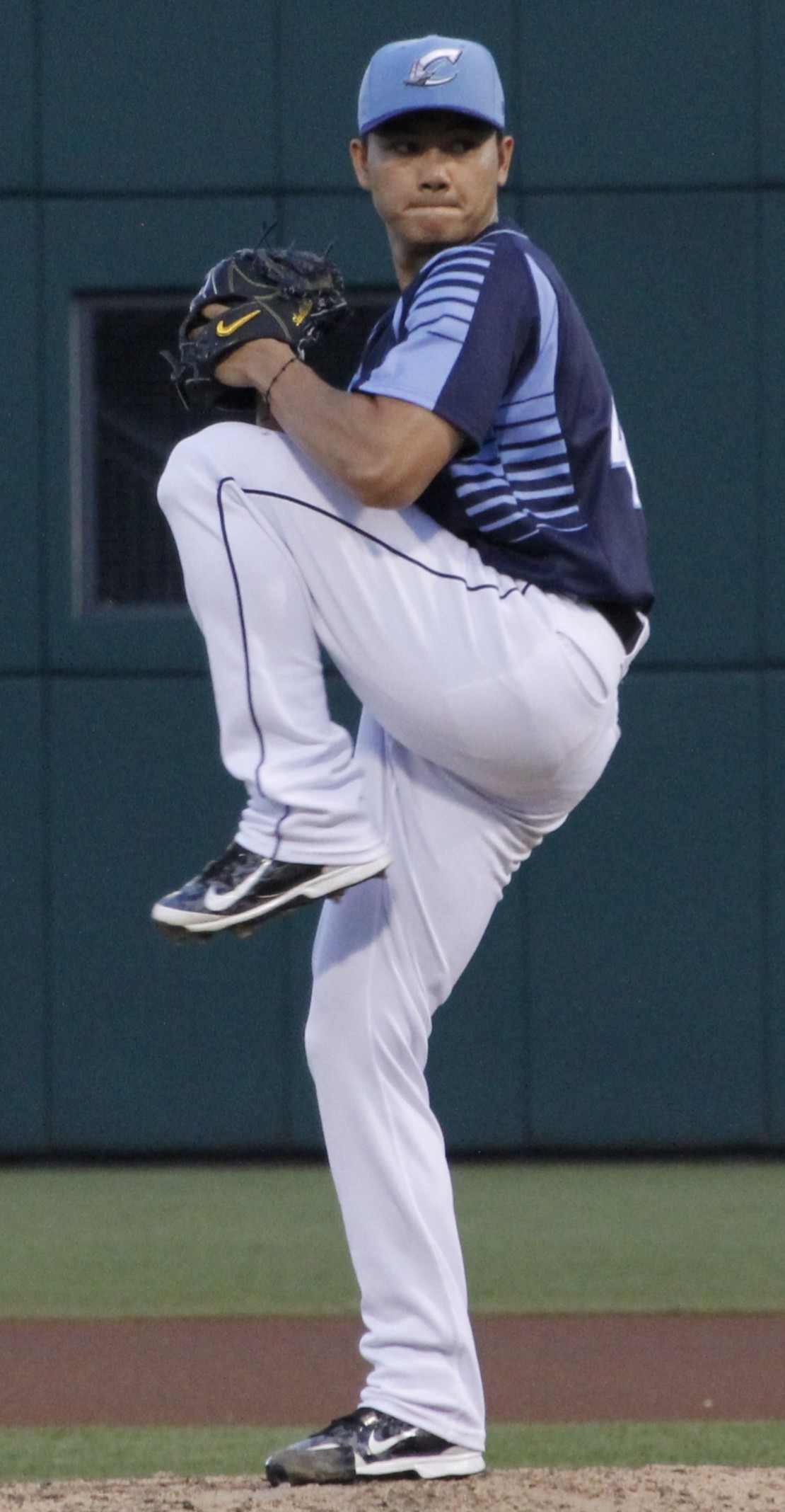 中文（台灣）: Shao-Ching Chiang 20180628